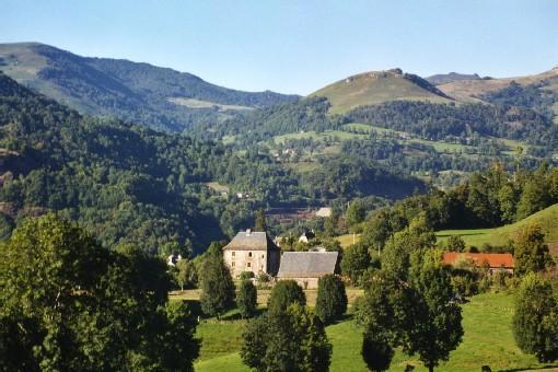 Chateau de La Salle à Vic-sur-Cère